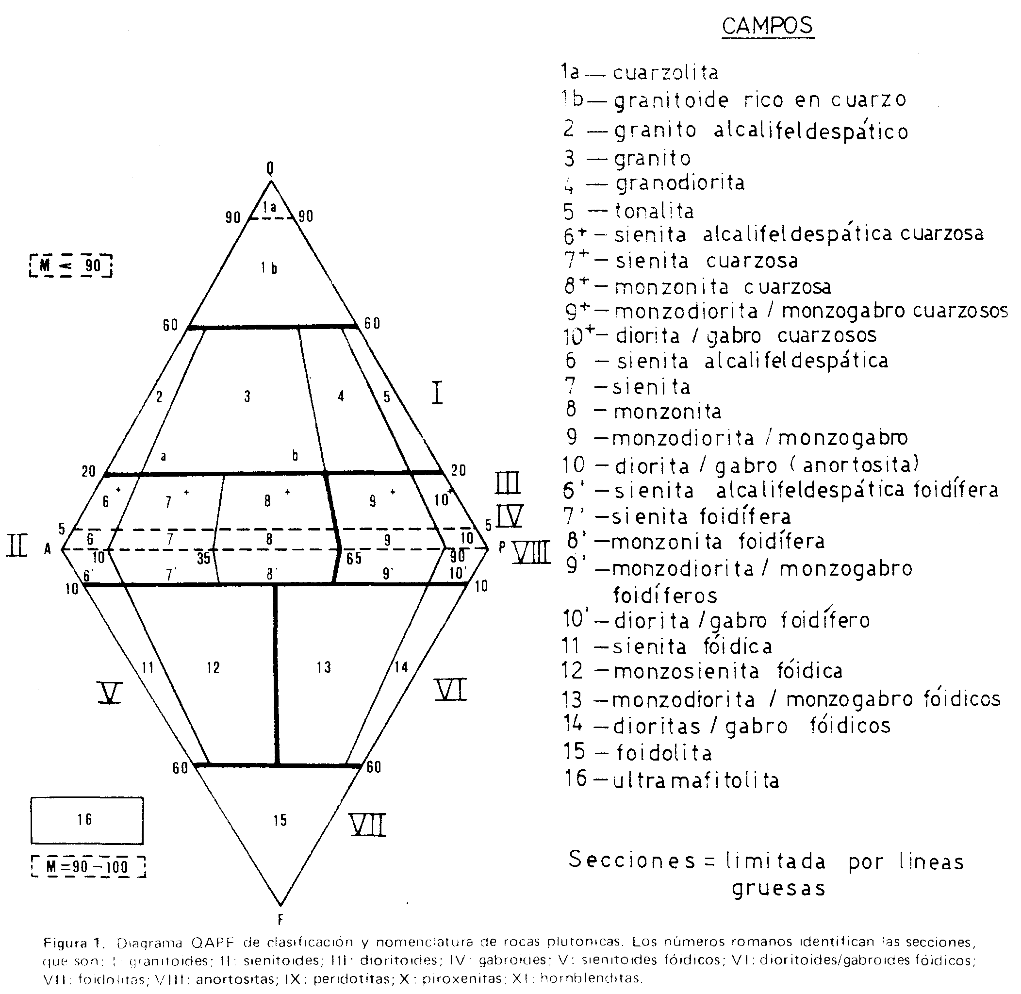 Diagrama QAPF de Clasificación de Rocas Igneas Intrusivas